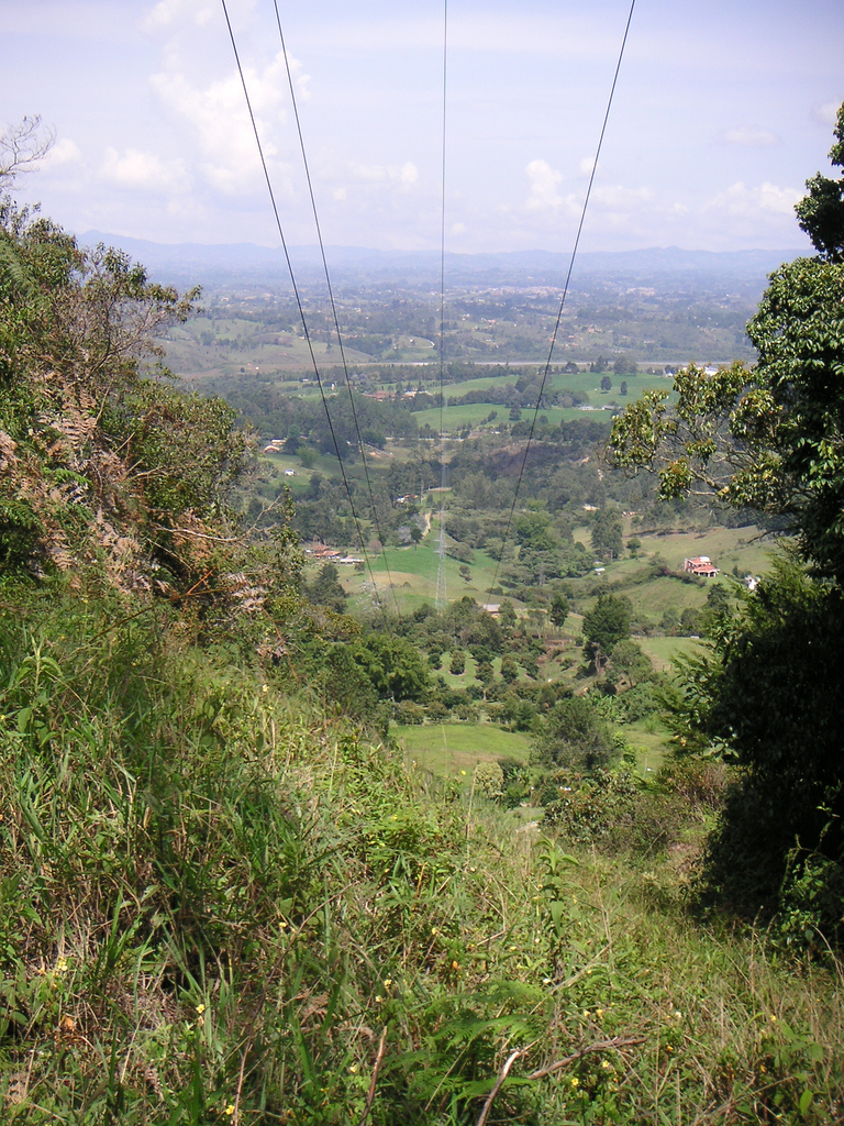 vista del área rural del Municipio de Rionegro, Antioquia, Colombia.Walk in the mountains, Rionegro, Colombia